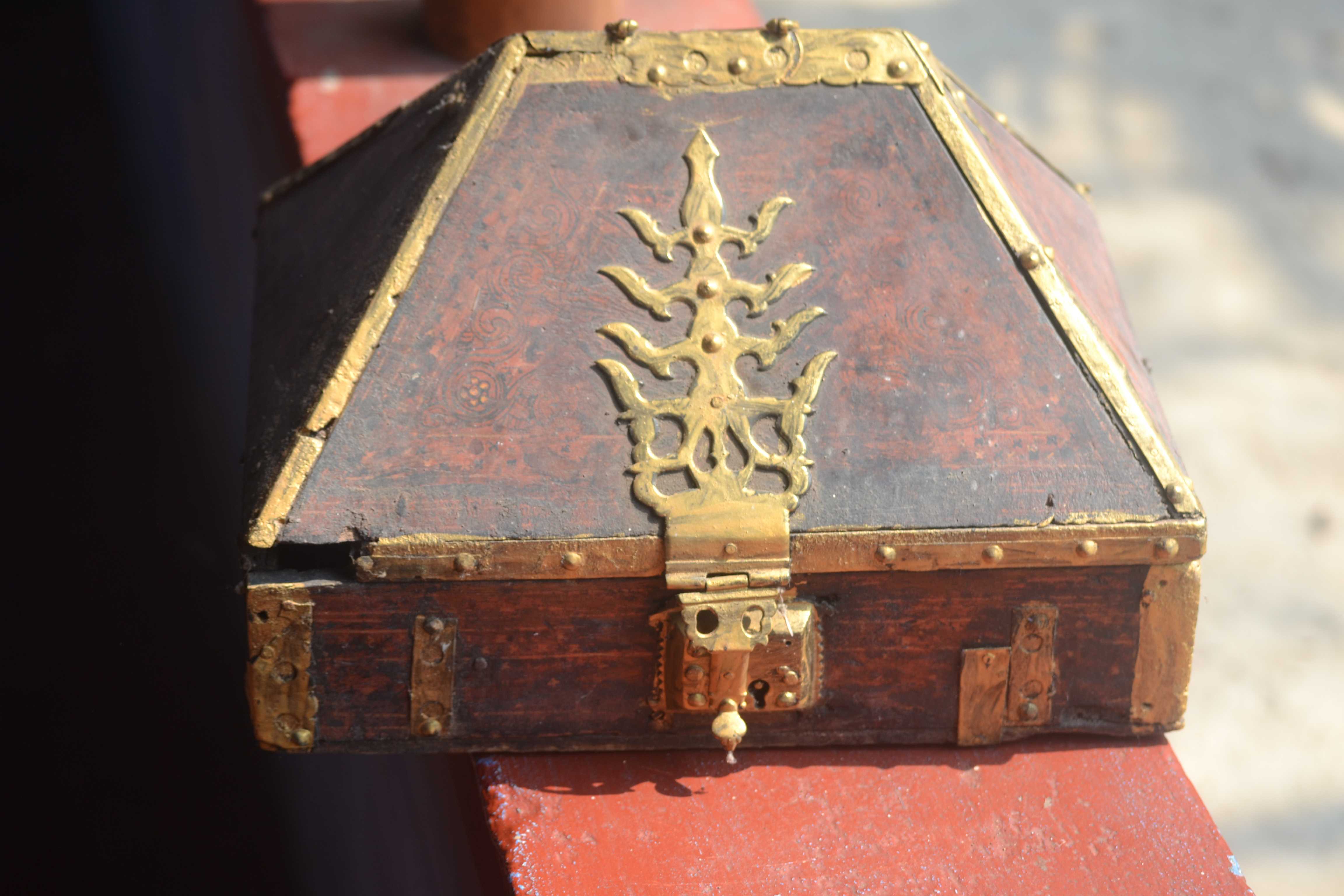 ചെല്ലപ്പെട്ടി